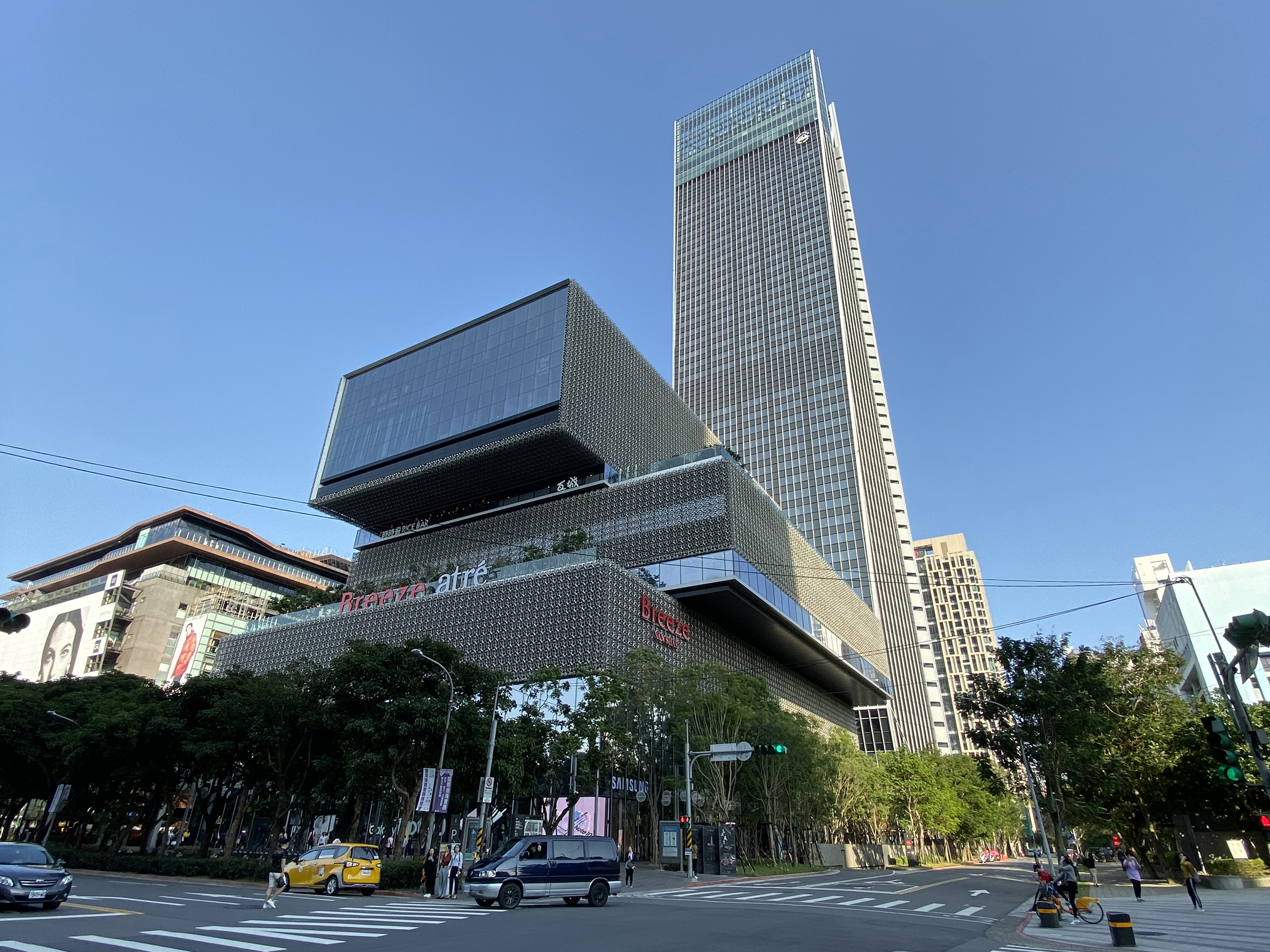 Taipei Nan Shan Plaza